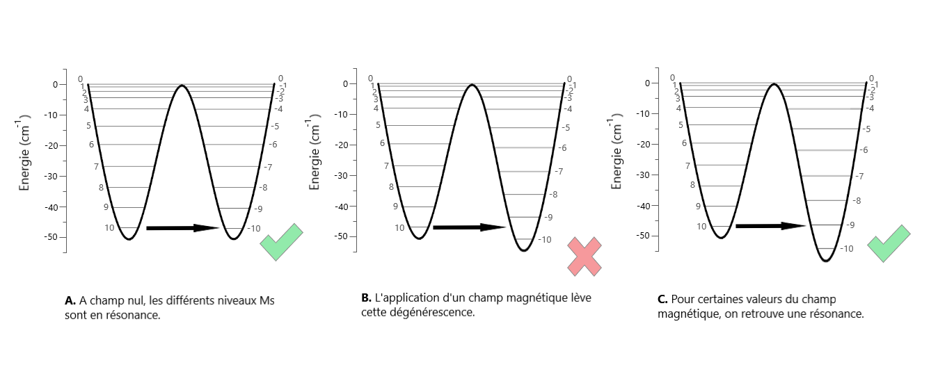 Double-puits quantique pour différentes valeur du champ magnétique.